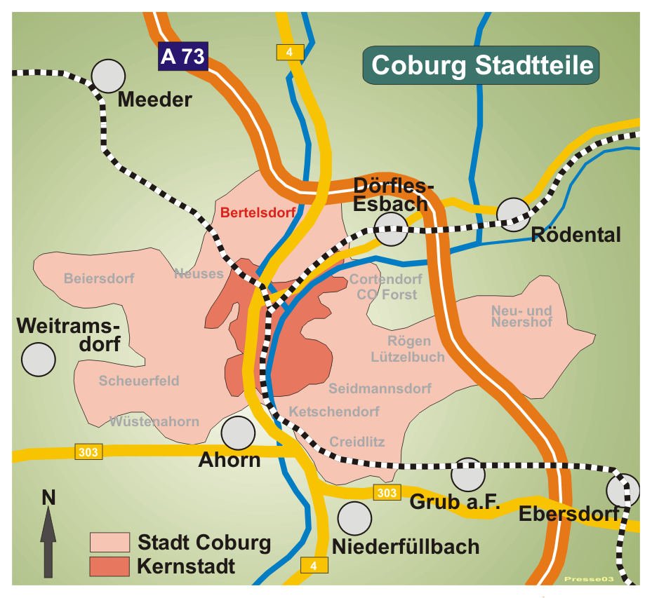 Karte von Coburg, Stadtteil Bertelsdorf